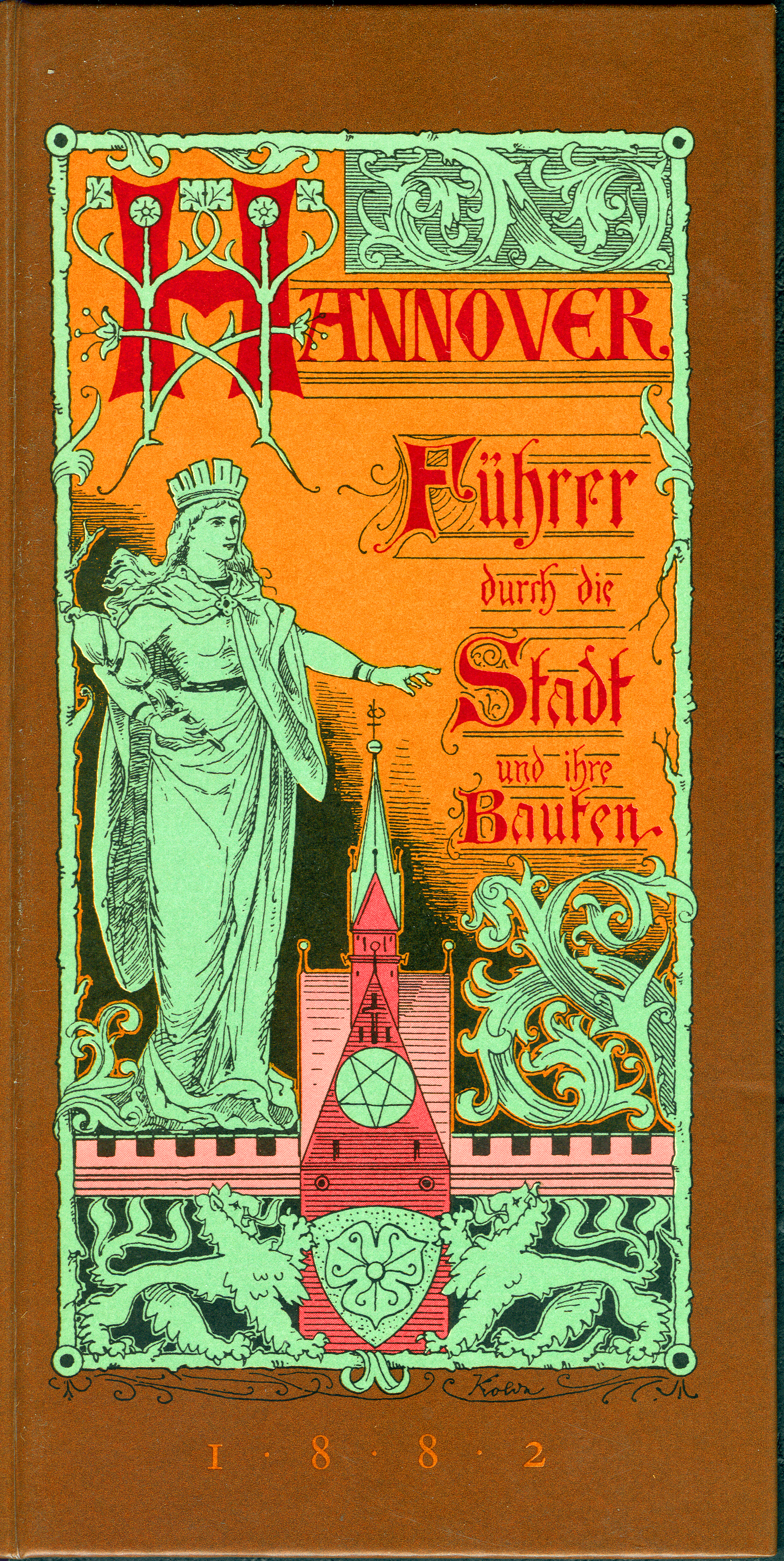 Der als Offsetdruck-reproduzierte und ursprünglich von dem Architekten Max Kolde entworfene Umschlagtitel für den von Theodor Unger 1882 herausgegebenen und im Klindworth’s Verlag und Lithografie erschienenen Architekturführers „Hannover. Führer durch die Stadt und ihre Bauten.“ ...